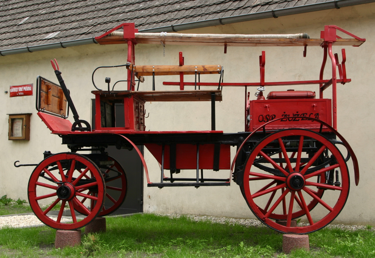 Ochotnicza Straż Pożarna w Żużelcy – wieś w Polsce położona w województwie opolskim, w powiecie krapkowickim, w gminie Krapkowice.